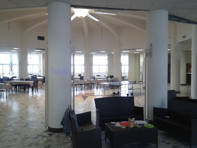 Refettorio